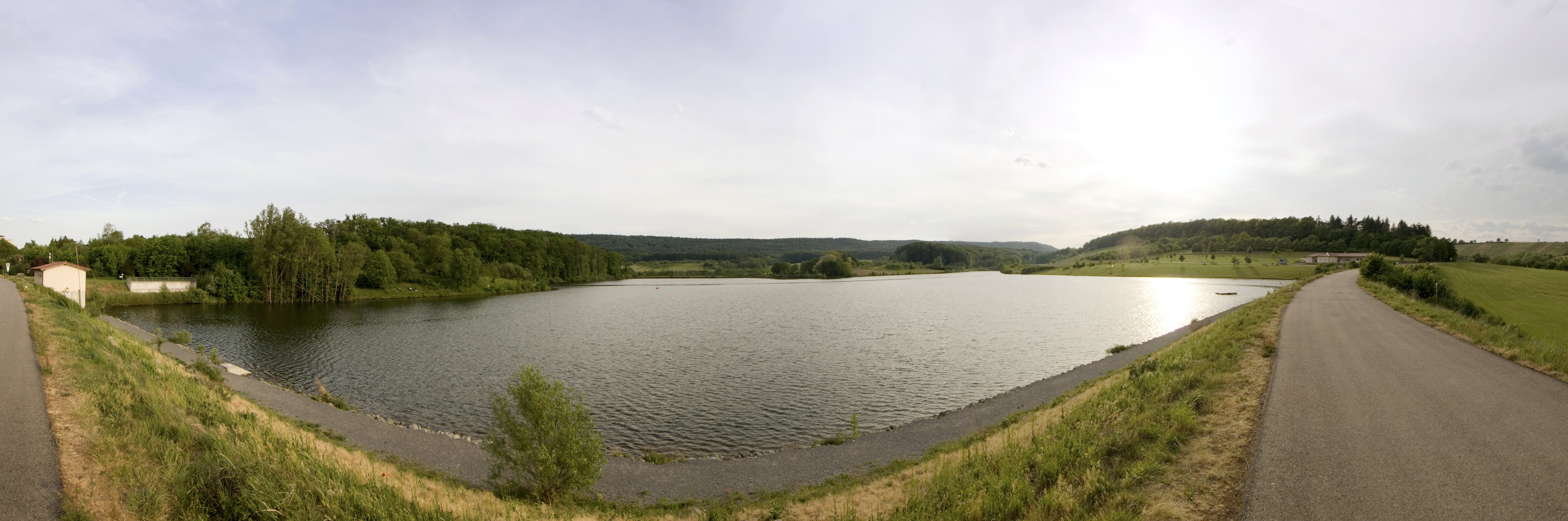 Lake Ehmetsklinge